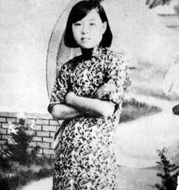 Imperial Concubine Tan Yulin (譚玉齡, 1920-1942)